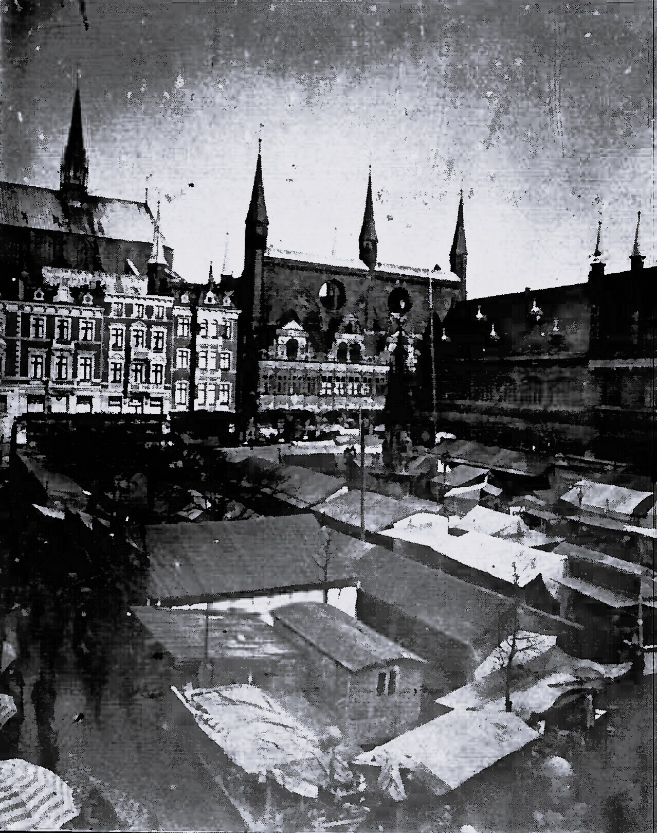 Seit alter Zeit hatte sich der Weihnachtsmarkt mit seinem Budenzauber auf dem Lübecker Marktplatz erhalten. Allmählig war nun der Platz um den Marktbrunnen herum zu eng geworden. So wurde 1924 der Platz wischen dem Holstentor und dem alten Bahnhof mit hinzugenommen, wo sich ein überaus reges Leben abspielte. Dies war auch deswegen der Fall, da diese Filiale des Weihnachtsmarktes sich durch Karussells, Luftschaukeln und und andere Vergnügungsinstitute, die es auf dem Marktplatz nicht gab, auszeichnete.